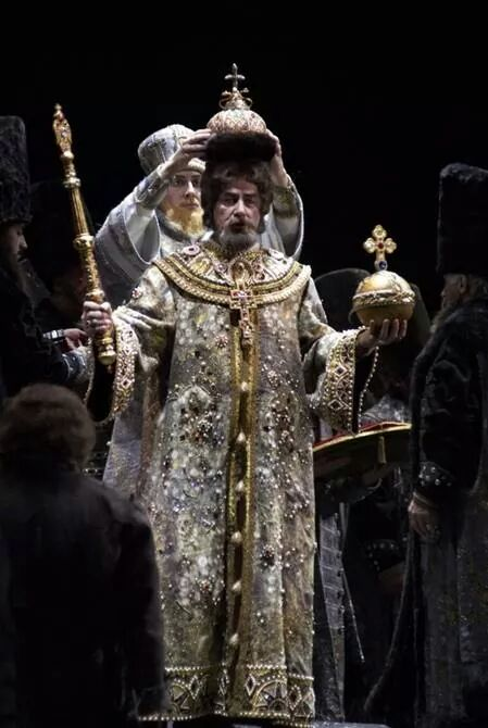 Владимир Кудашев в роли Бориса Годунова в одноименной опере М.П. Мусоргского. Красноярский театр оперы и балета.